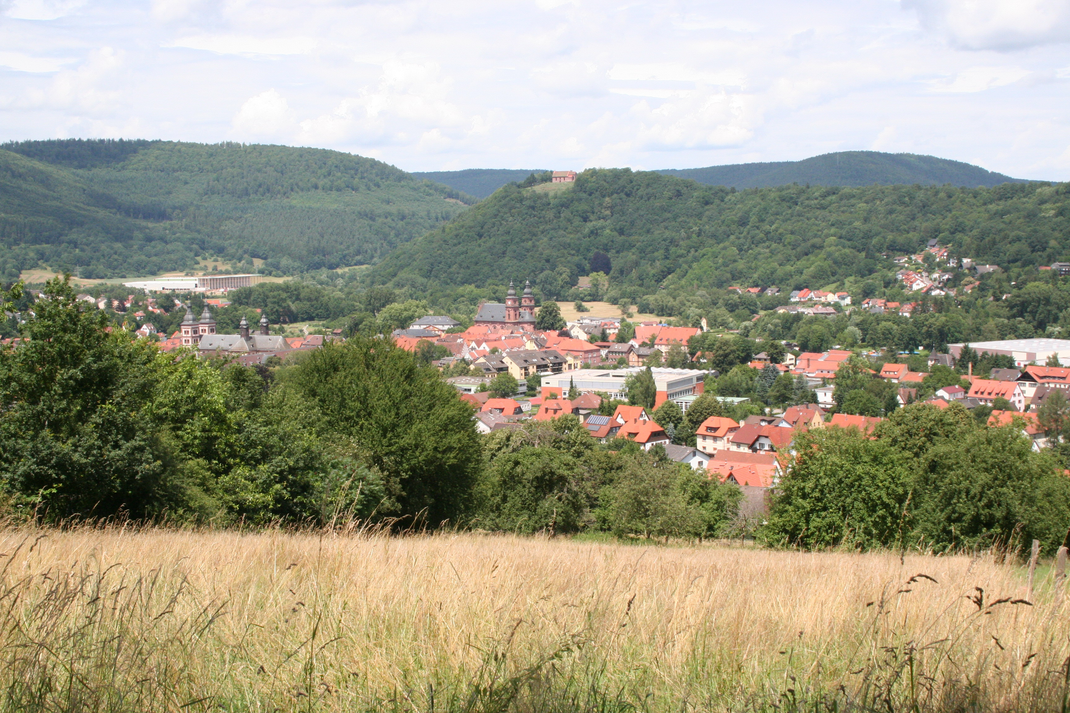 Blick auf Amorbach